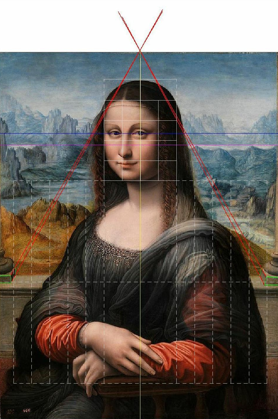 proporción y perspectiva del cuadro de mona lisa del museo del Prado